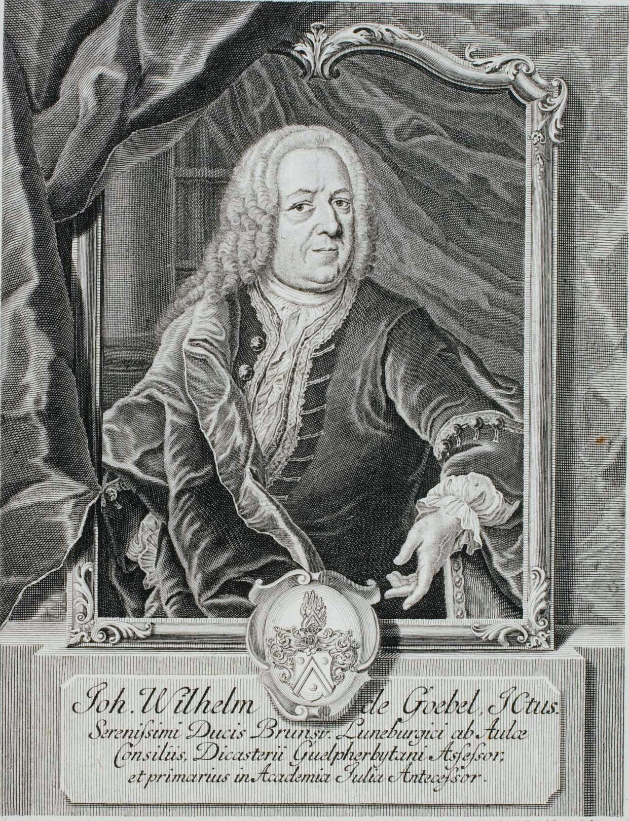 Porträt Johann Wilhelm von Goebel (1683–1745), deutscher Jurist und Hochschullehrer